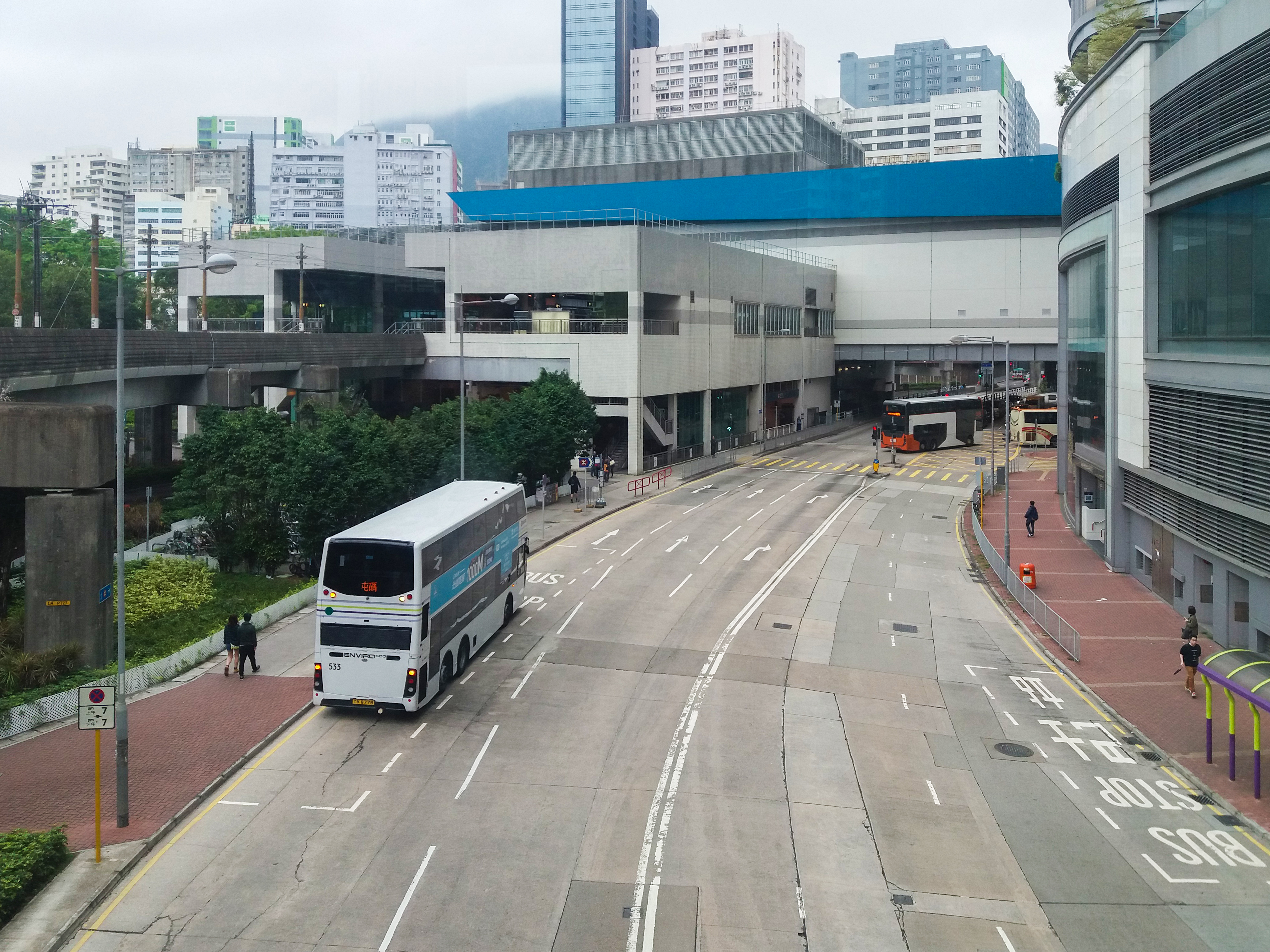 中文（香港）: 杯渡路（2019年）